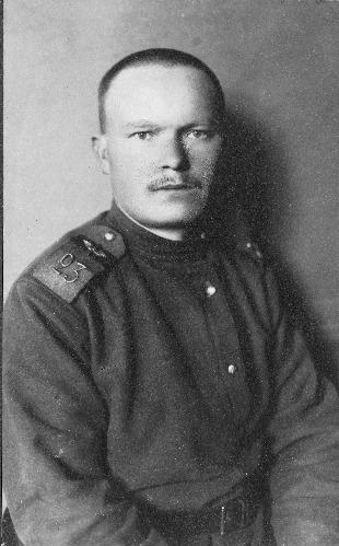 Veltveebel Karl Hugo Akel Vene 23.korpuse lennusalga fotograafina Esimese maailmasõja ajal.